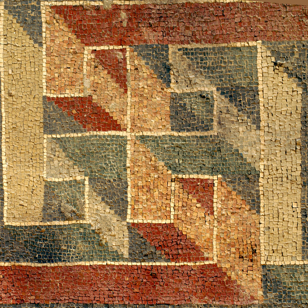 A detail of geometric decoration in the Villa. Although smaller the detail and the mastery of the mosaicist of this Villa equals the Villa at Piazza Armerina. Dettaglio del "Mosaico della caccia" della villa romana del Tellaro a Noto (Siracusa).